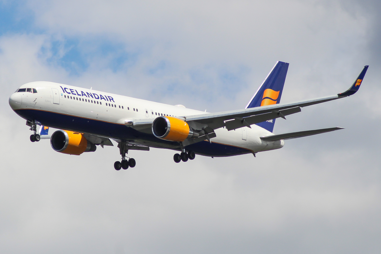 TF-ISW Boeing 767 Icelandair